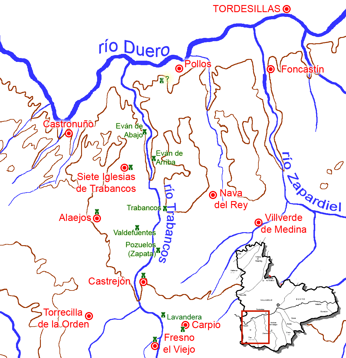 Distribución de las fortalezas medievales de la frontera entre los reinos de Castilla y de León en el siglo XII (Valladolid, España). Citado en: MAÑANES, T. y VALBUENA, F. (1977): "Torres y fortalezas medievales al sur del Duero en la provincia de Valladolid". Boletín del seminario de Arte y Arqueología, volumen XLIII. Editado por la Universidad de Valladolid. Páginas 111-126.